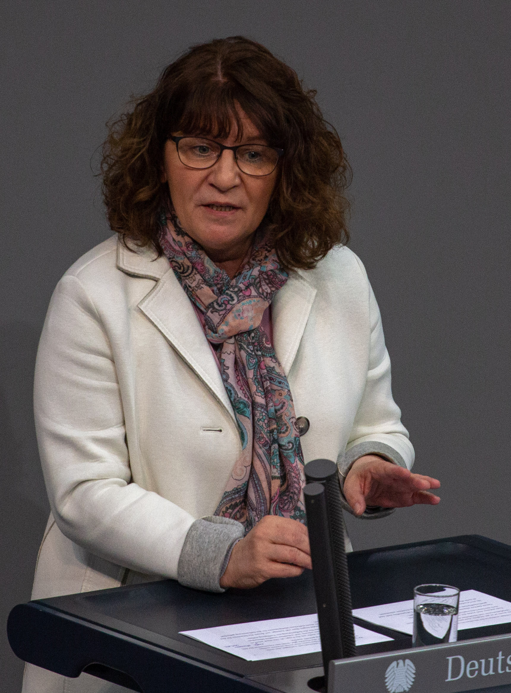 Martina Stamm-Fibich, Mitglied des Deutschen Bundestages, während einer Plenarsitzung am 11. April 2019 in Berlin.